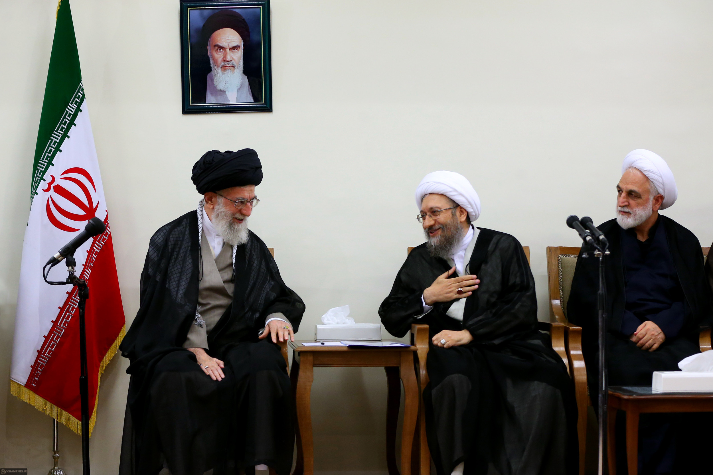 دیدار رئیس و مسئولان قوه قضائیه با مقام معظم رهبری - رئیس و مسئولان قوه‌ی قضائیه، عصر امروز (چهارشنبه) با حضرت آیت‌الله خامنه‌ای رهبر انقلاب اسلامی دیدار کردند.